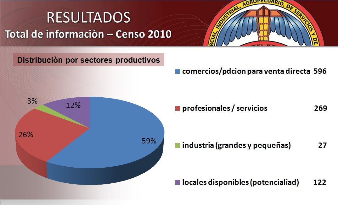 Distribuciòn de las actividades productivas de Villa del Rosario, Censo Comercial 2010